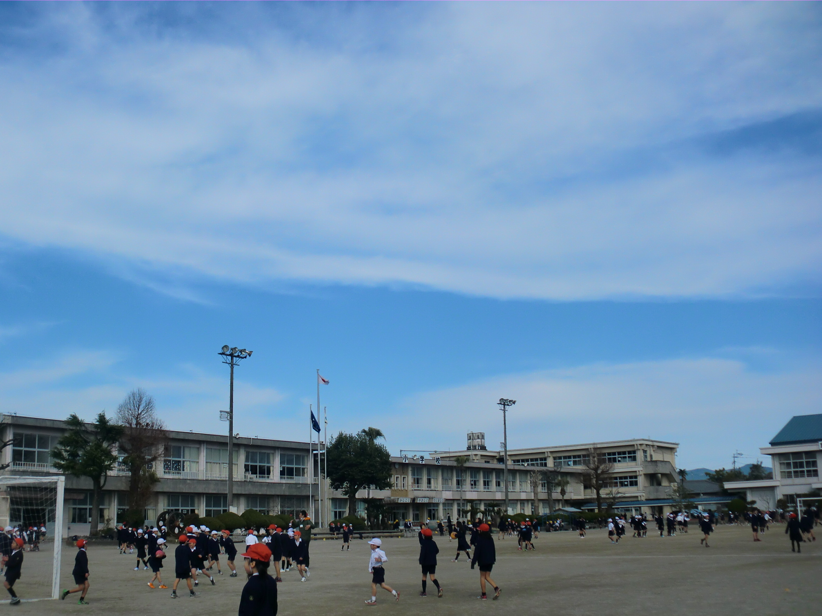 薩摩川内市にある薩摩川内市立可愛（えの）小学校